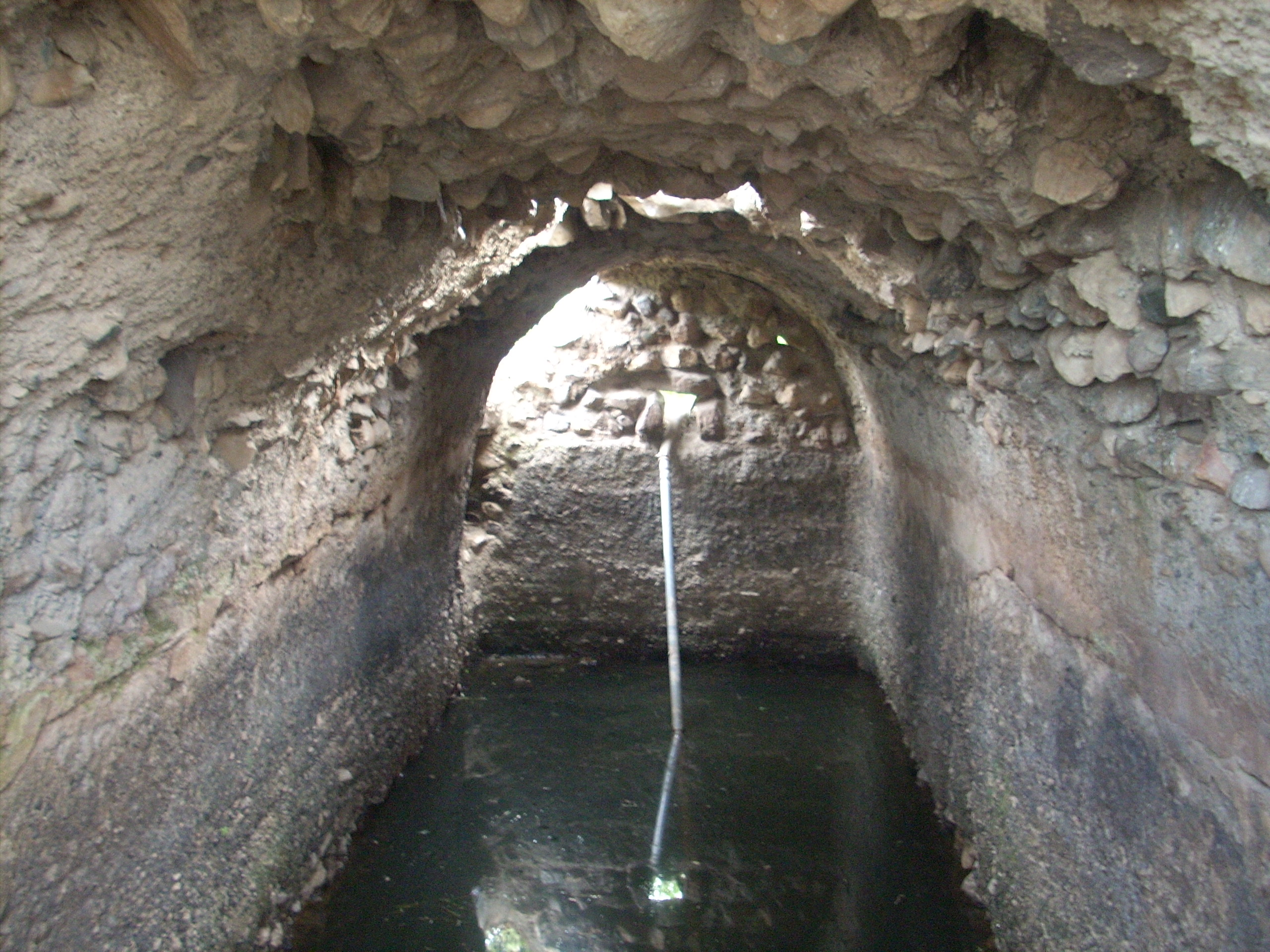 Vista del interior del Aljibe del Esparragal